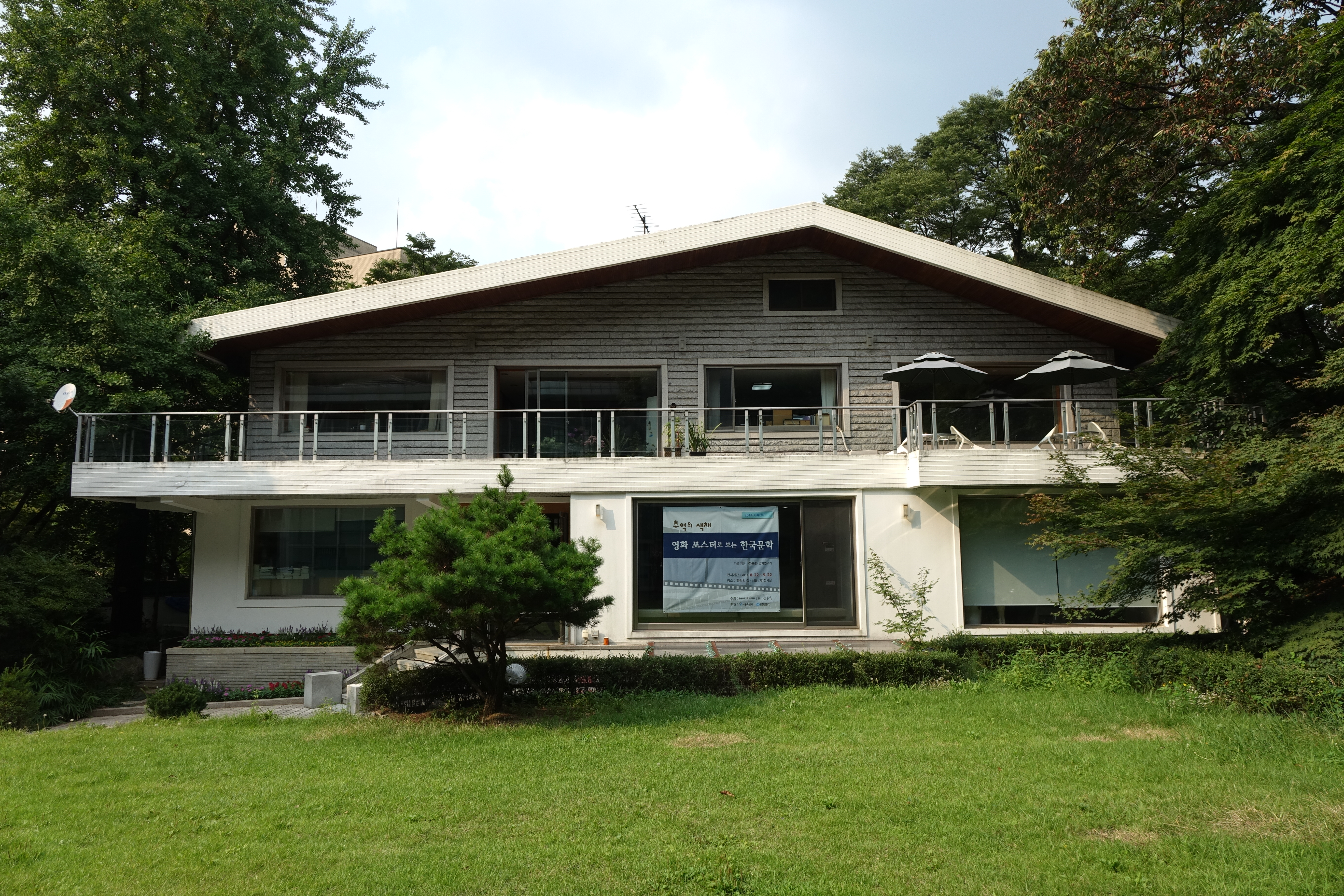 문학의 집 서울